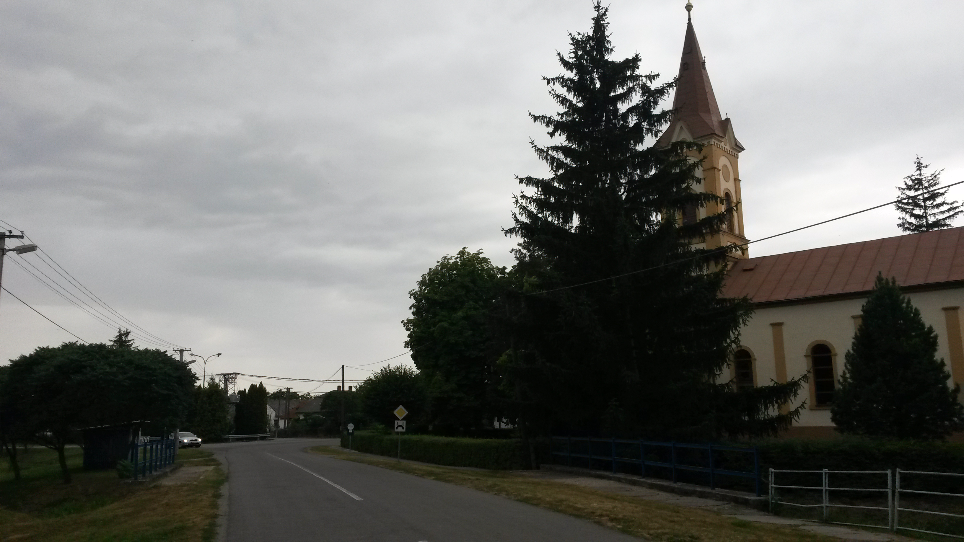 Blatná Polianka, kostol